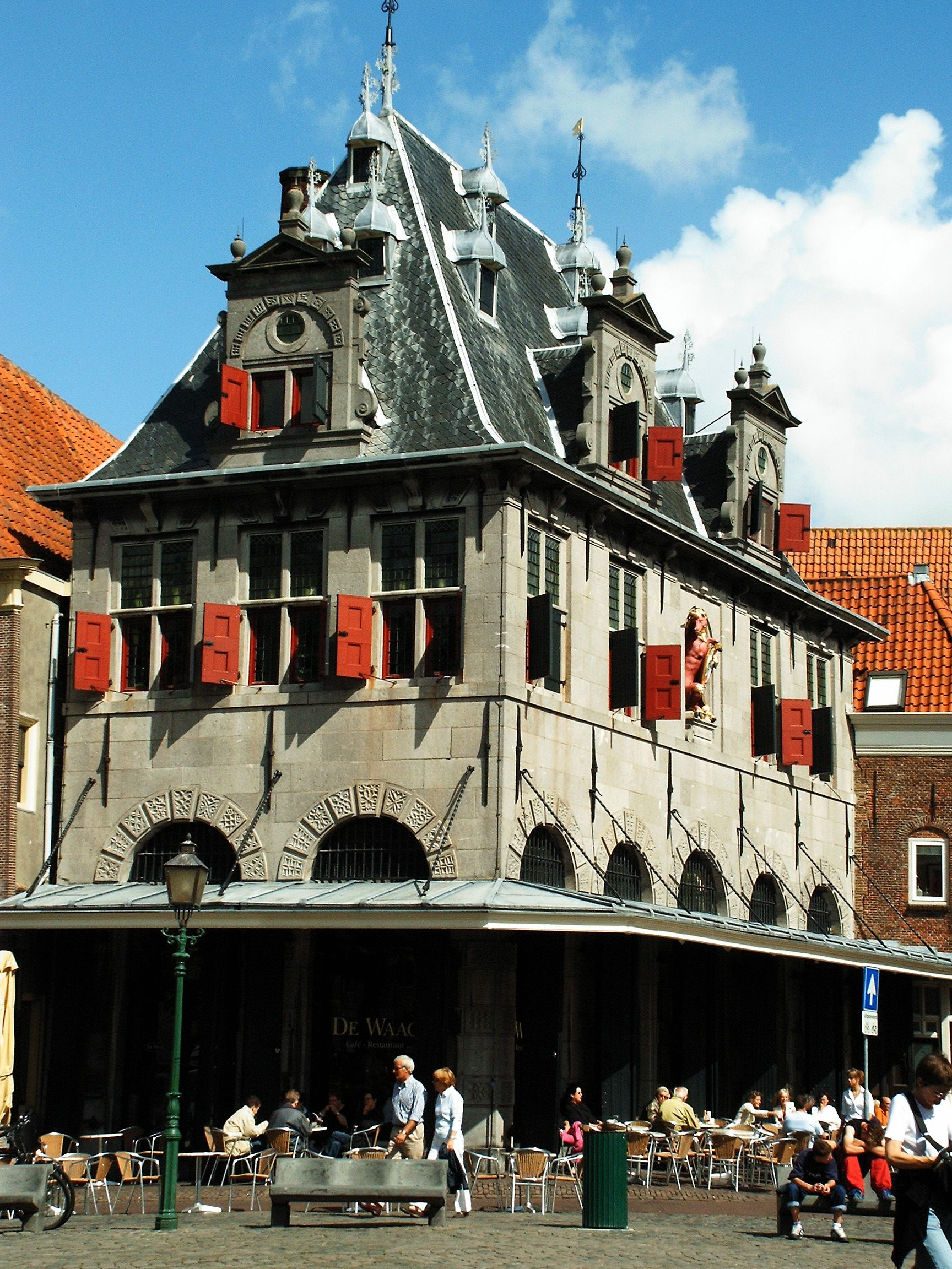 Hoorn - Stadtwaage